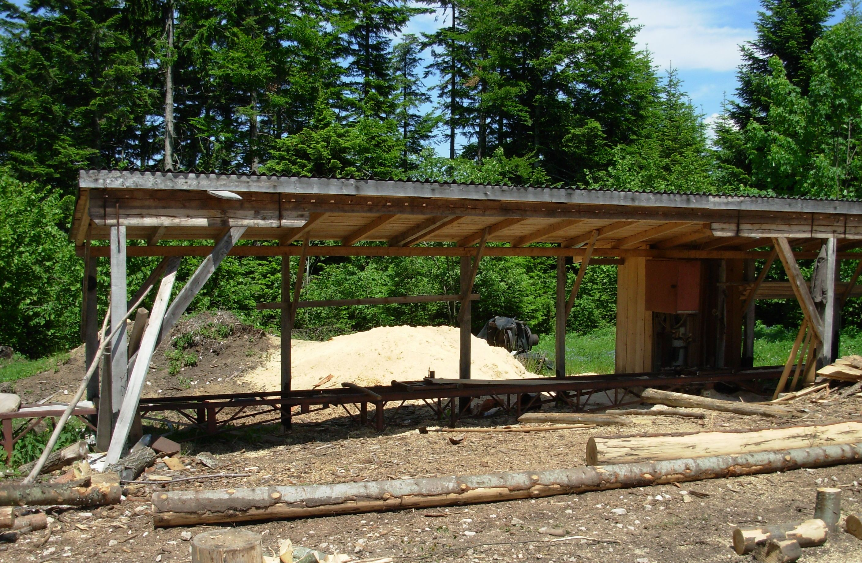 Srugara na Oštroj steni, planina Tara. Ovde se testera za sečenje pokreće dizel motorom. Slikao Goldfinger